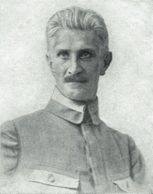 Ignacy Daszyński w mundurze I Brygady Legionów Polskich.